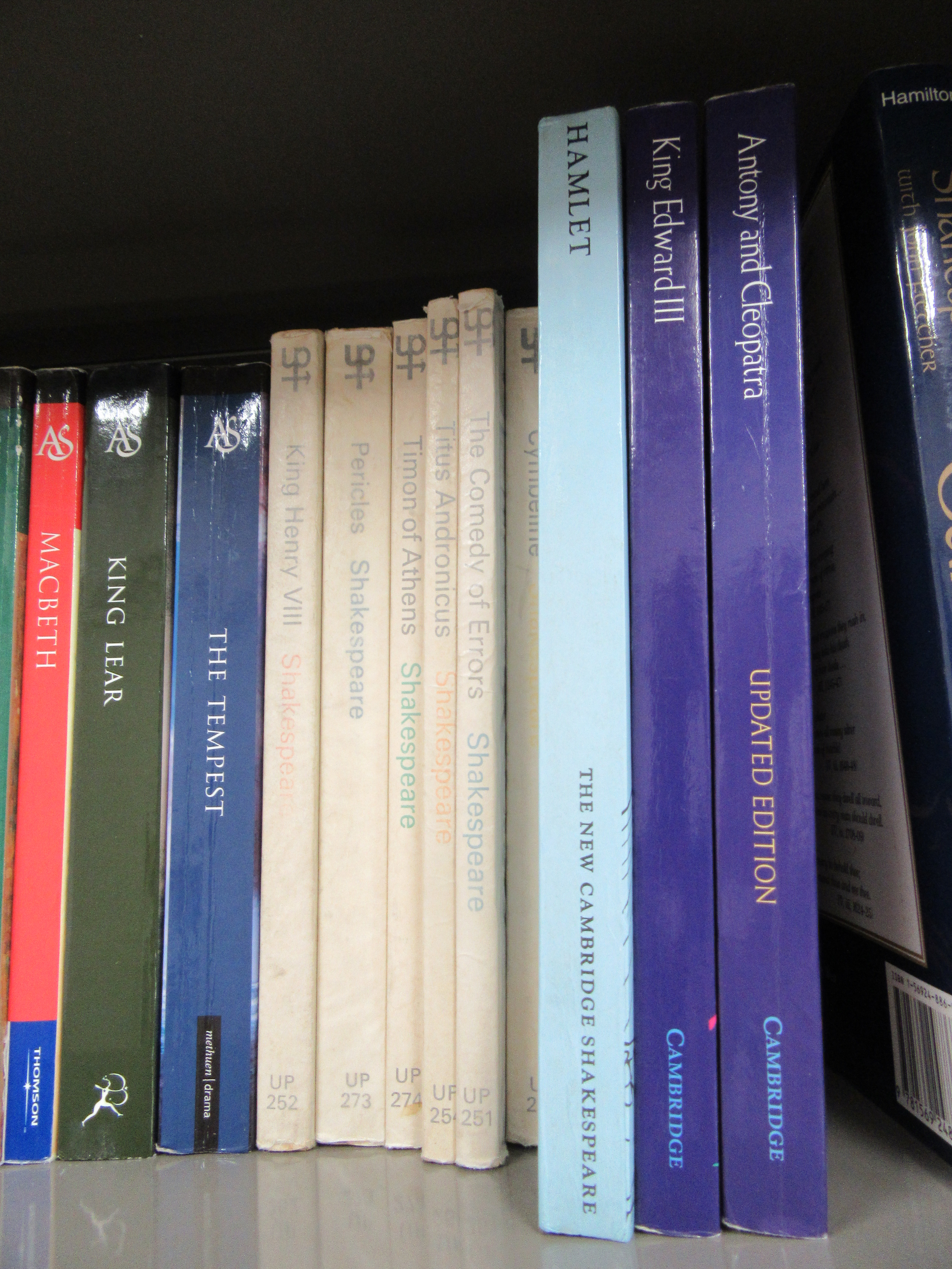 ニュー・ケンブリッジ版シェイクスピアの背